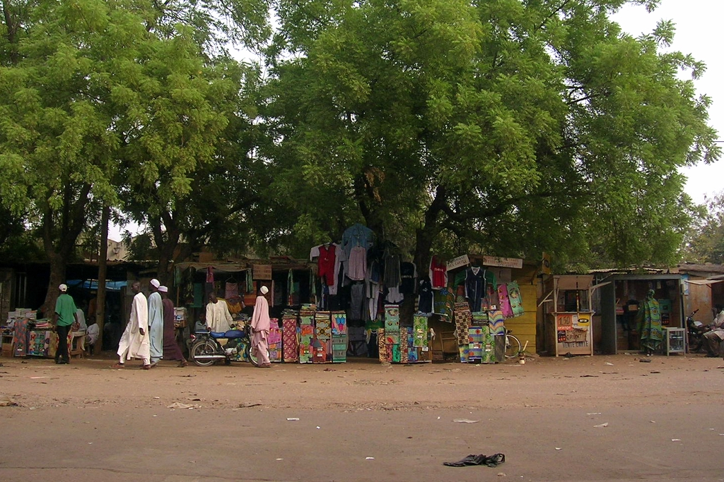 Marche a Garoua,Nord, Cameroon. The Market in Garoua, Nord, Cameroon.